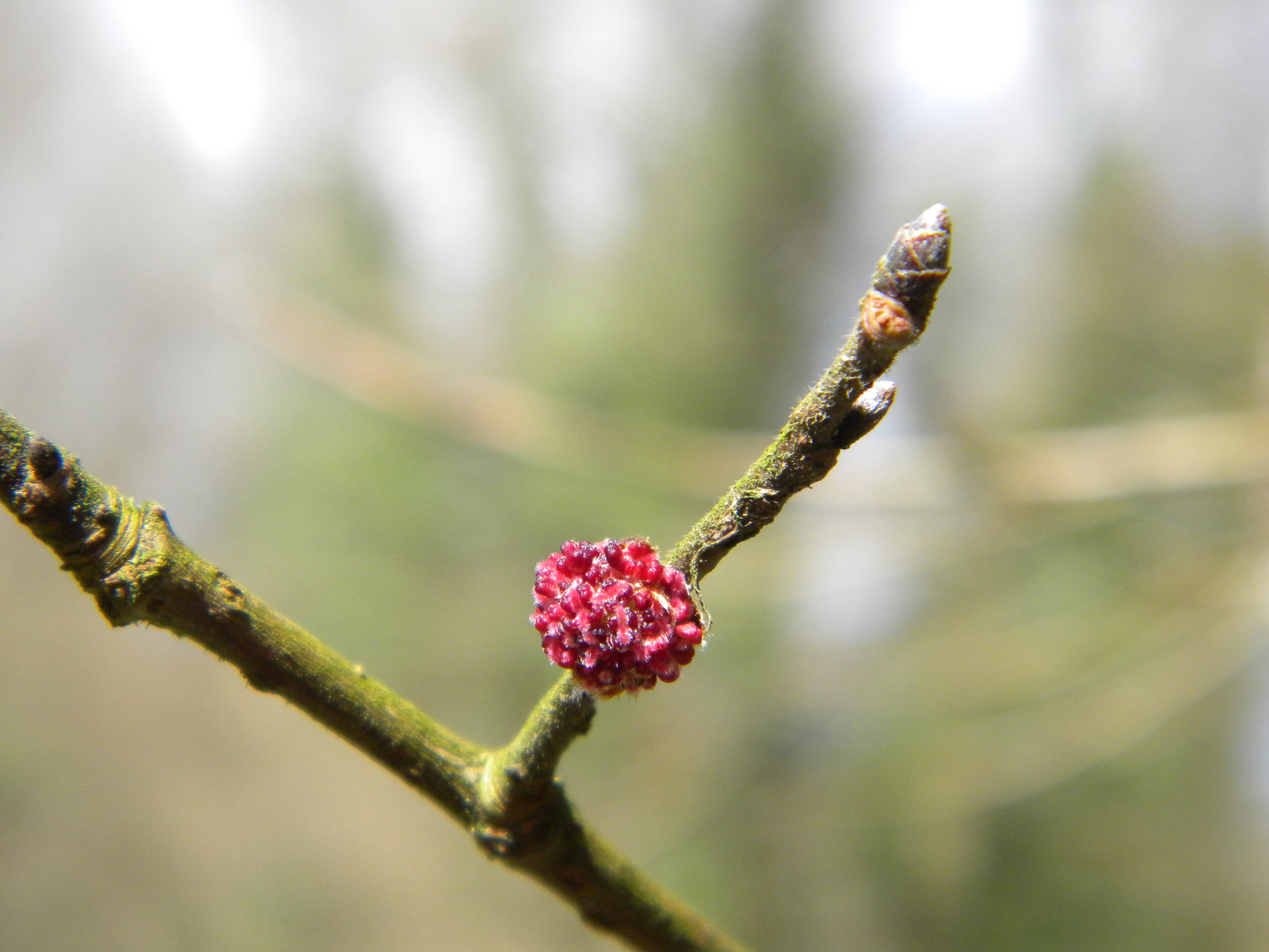 Ulmus